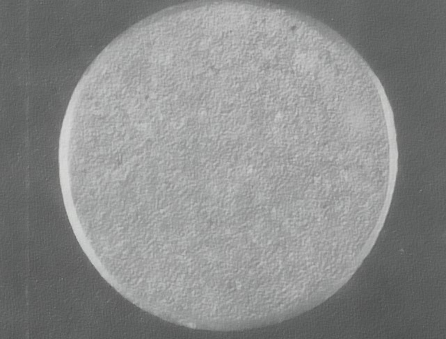 Gefeinter Versuchskörper aus AlMg-Legierung